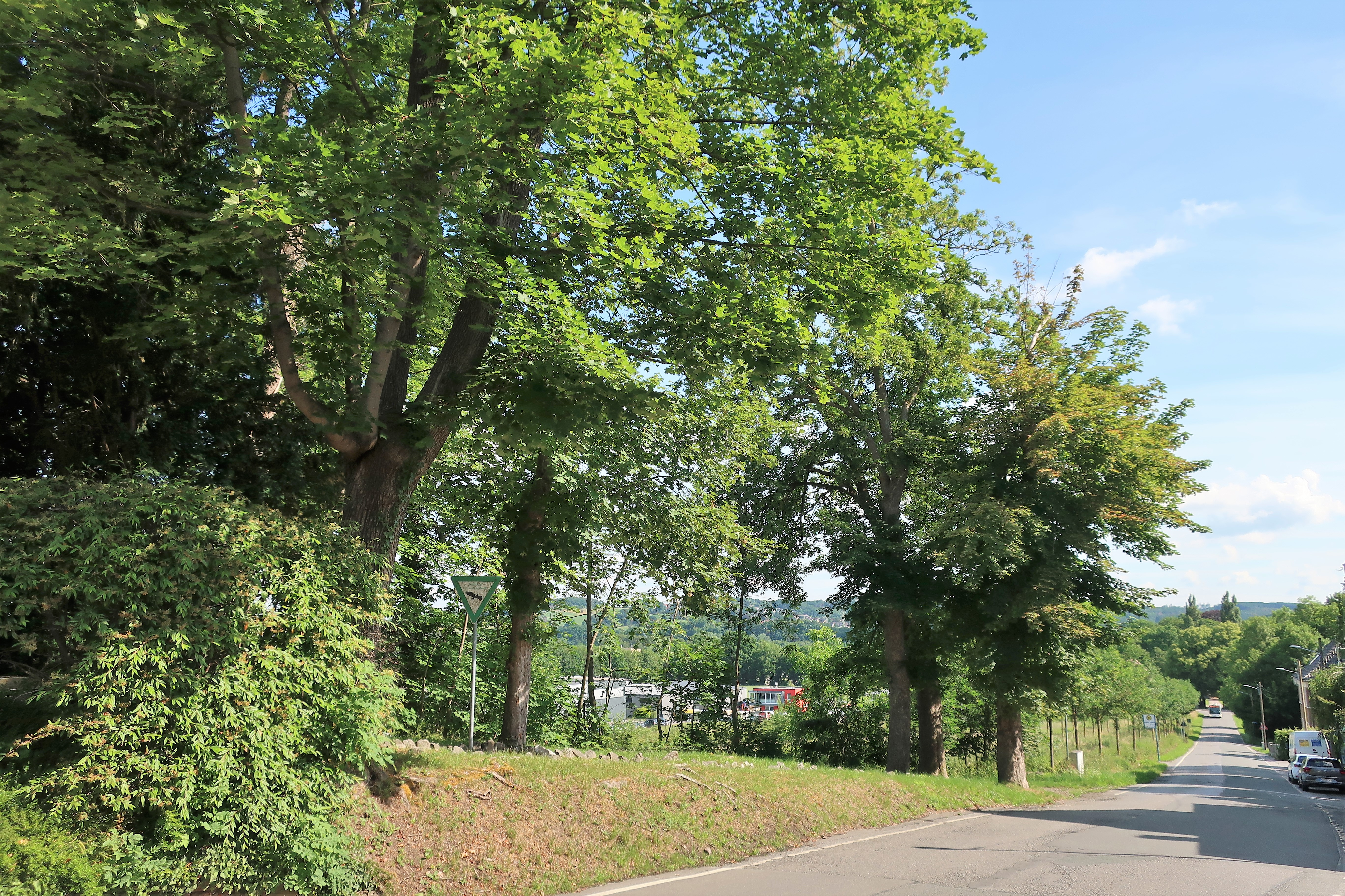 Ehemaliger geschützter Landschaftsbestandteil 1.4.2.32 „Allee Herbeck“ in Hagen-Herbeck. Restbäume der ehemaligen historischen Berg-/Spitz-Ahornallee. 80 Bäume mussten im Februar 2012 aus Verkehrssicherungsgründen gefällt werden. Durch eine Spende der Van Eupen Stiftung konnte anschließend eine Ersatzpflanzung mit 51 Stiel-Eichen stattfinden (Foto rechts unten).